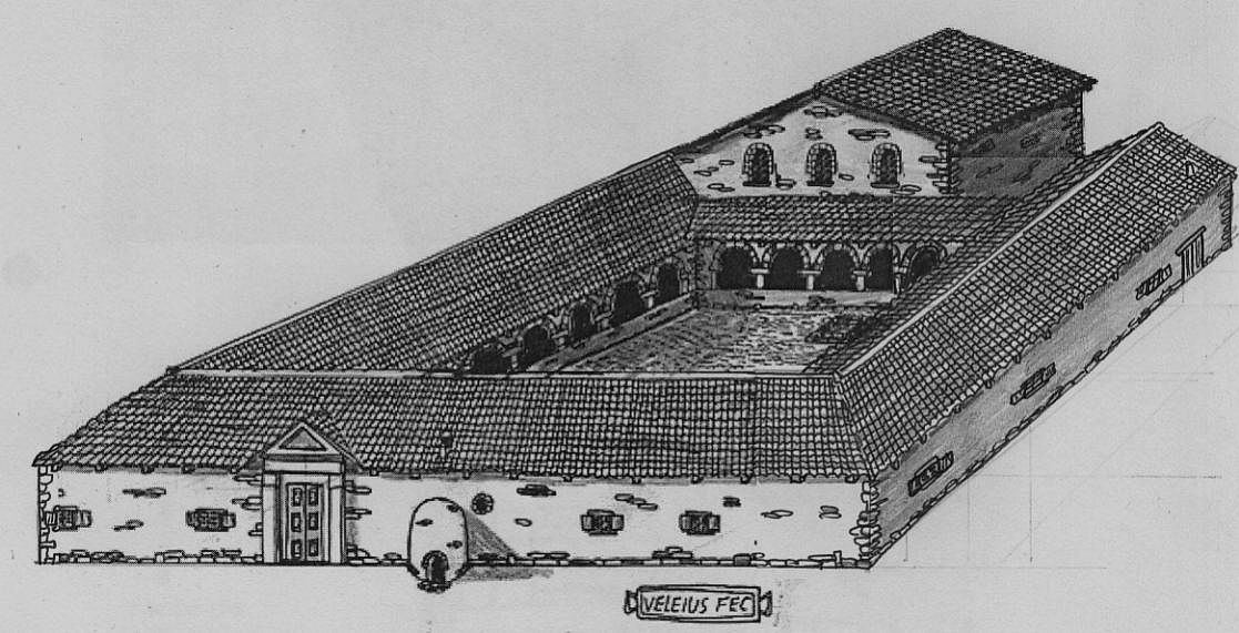 Rekonstruktionsversuch des spätantiken Praetoriums von Kastell Arbeia.